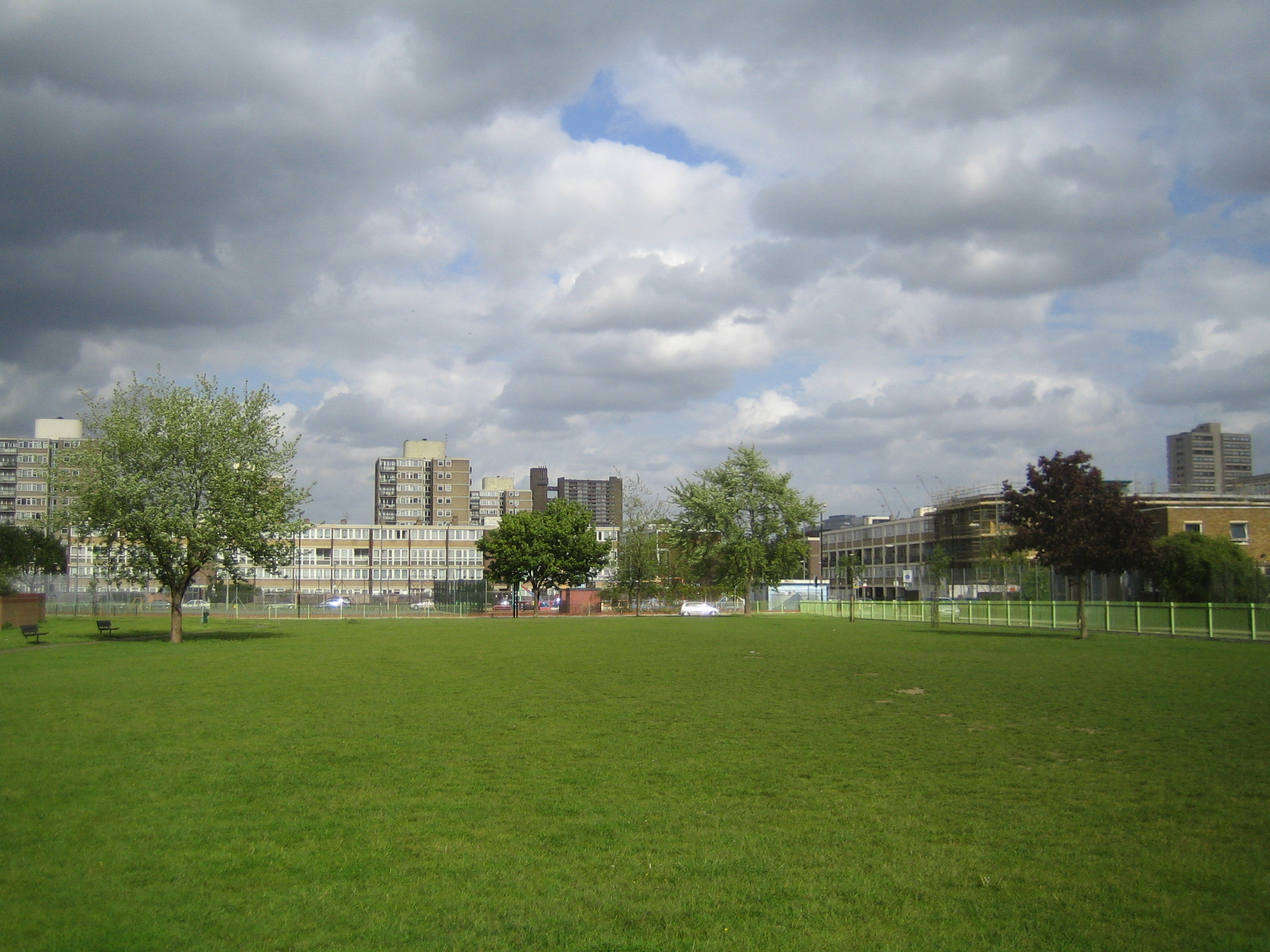 Bartlett Park